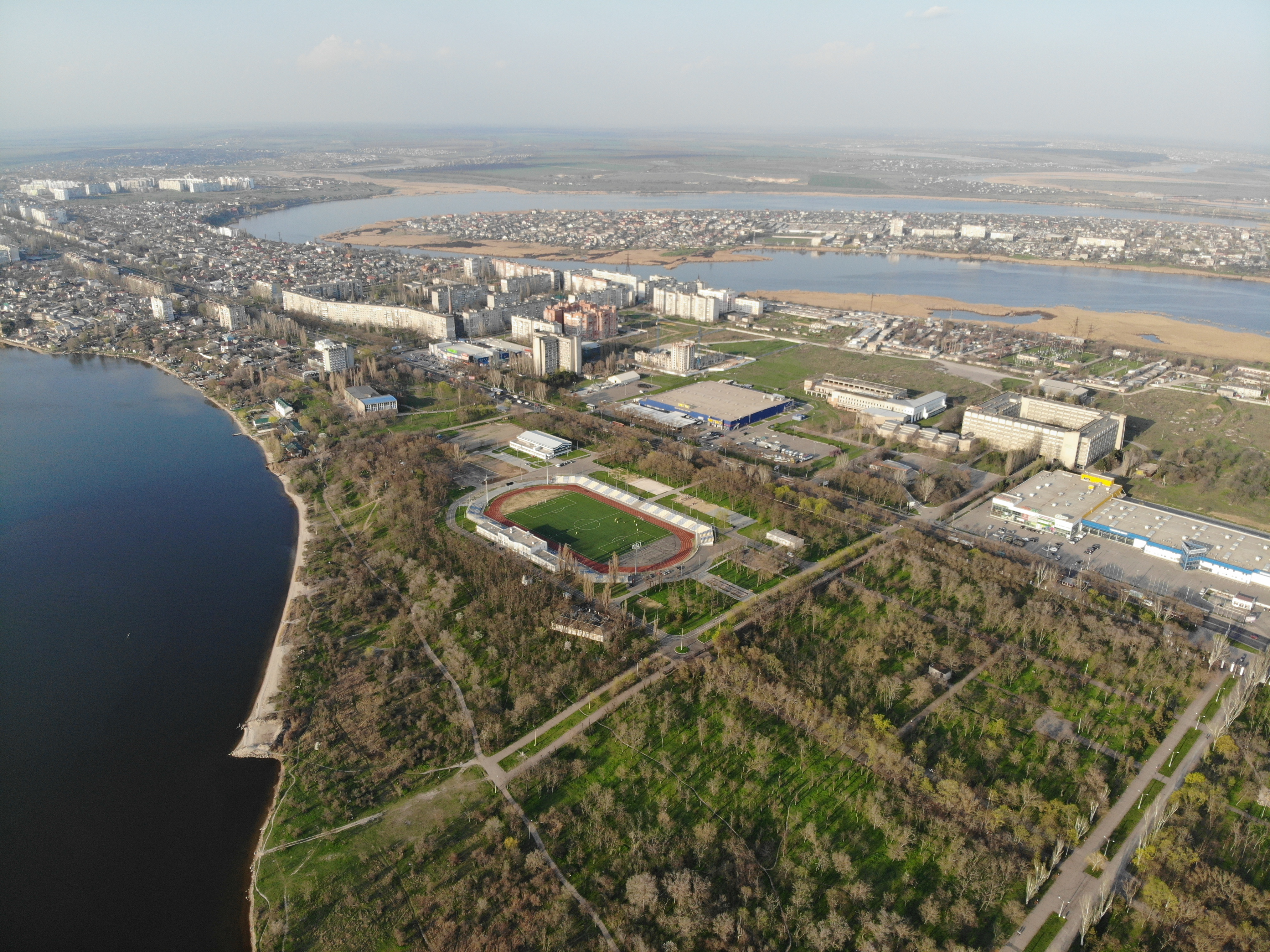 Парк Перемоги, м. Миколаїв, мкр. Соляні